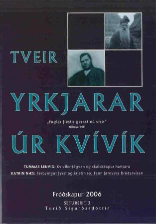 Føroyskt: Jóan Petur Gregoriussen: Tveir yrkjarar ur Kvivik